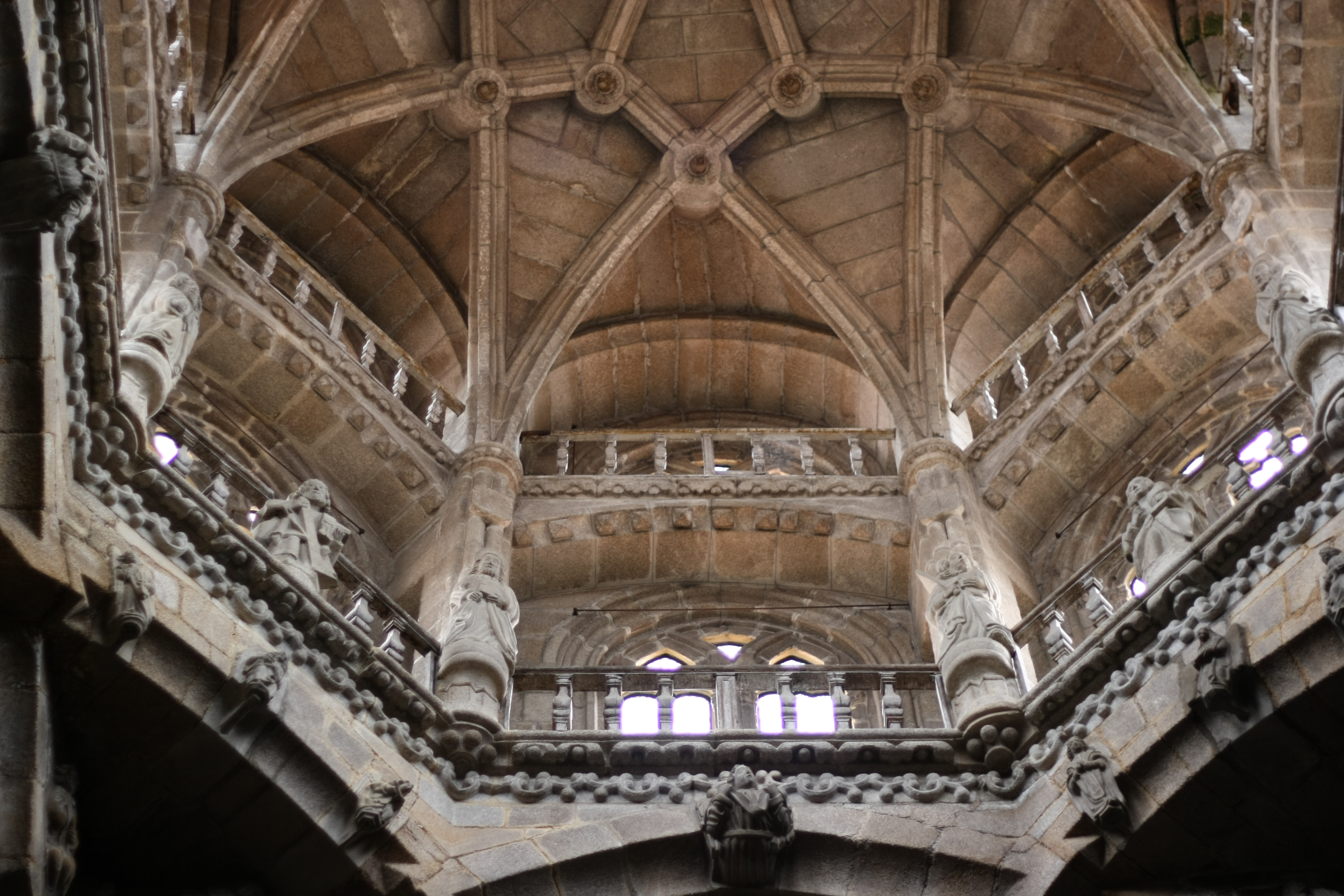 Kathedrale von Ourense, Kuppel über der Vierung